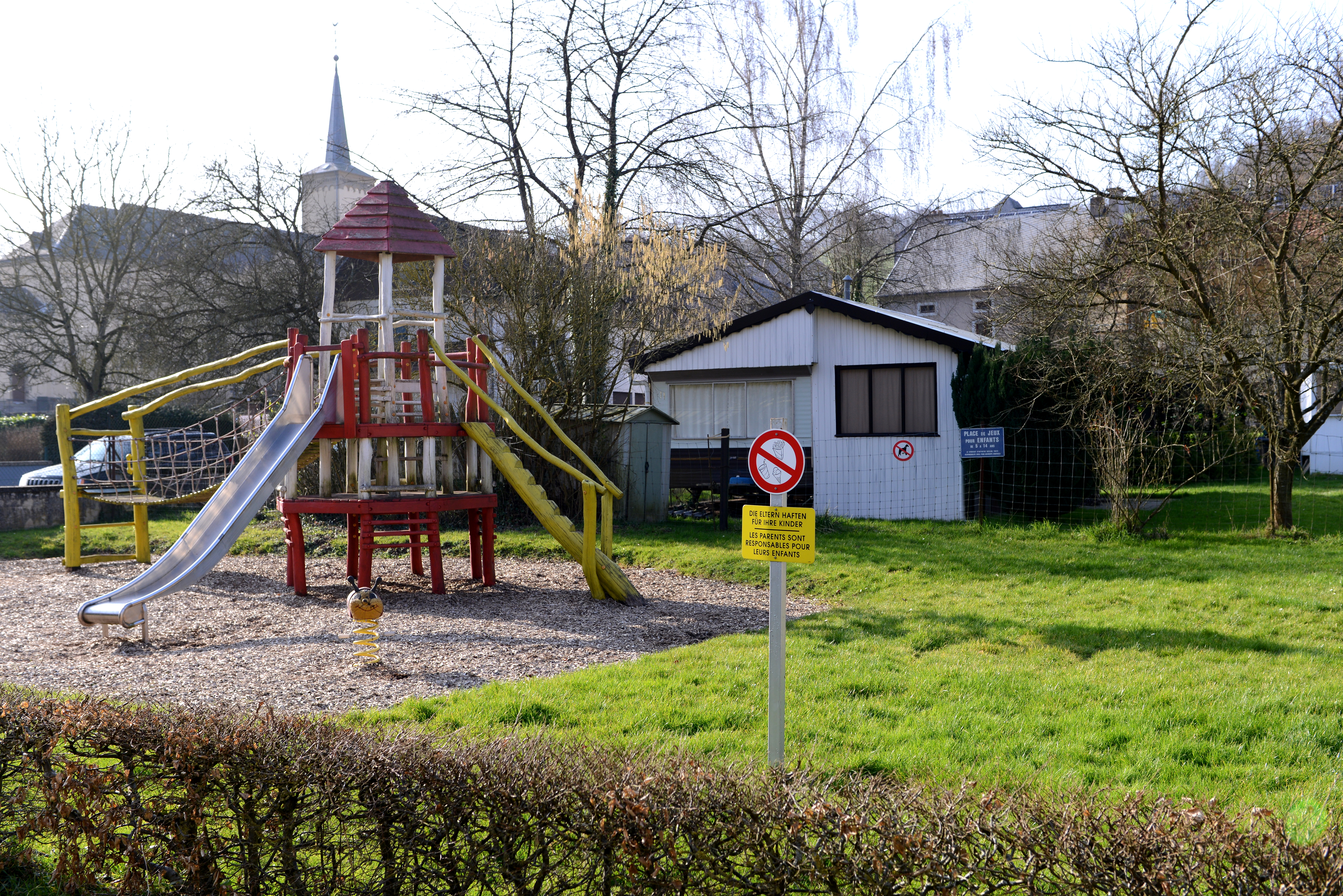 D'Spillplaz beim Camping zu Bur.